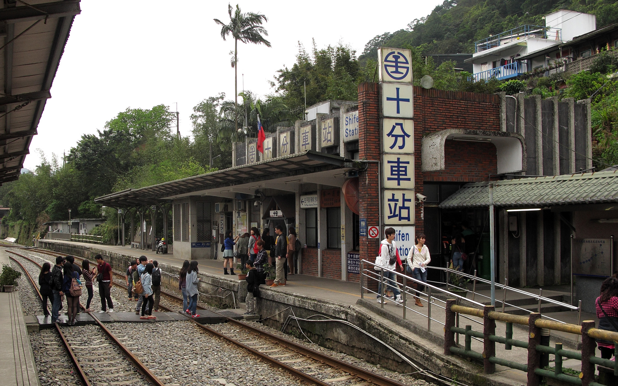 中文（台灣）: 臺灣鐵路管理局十分車站第一月台。